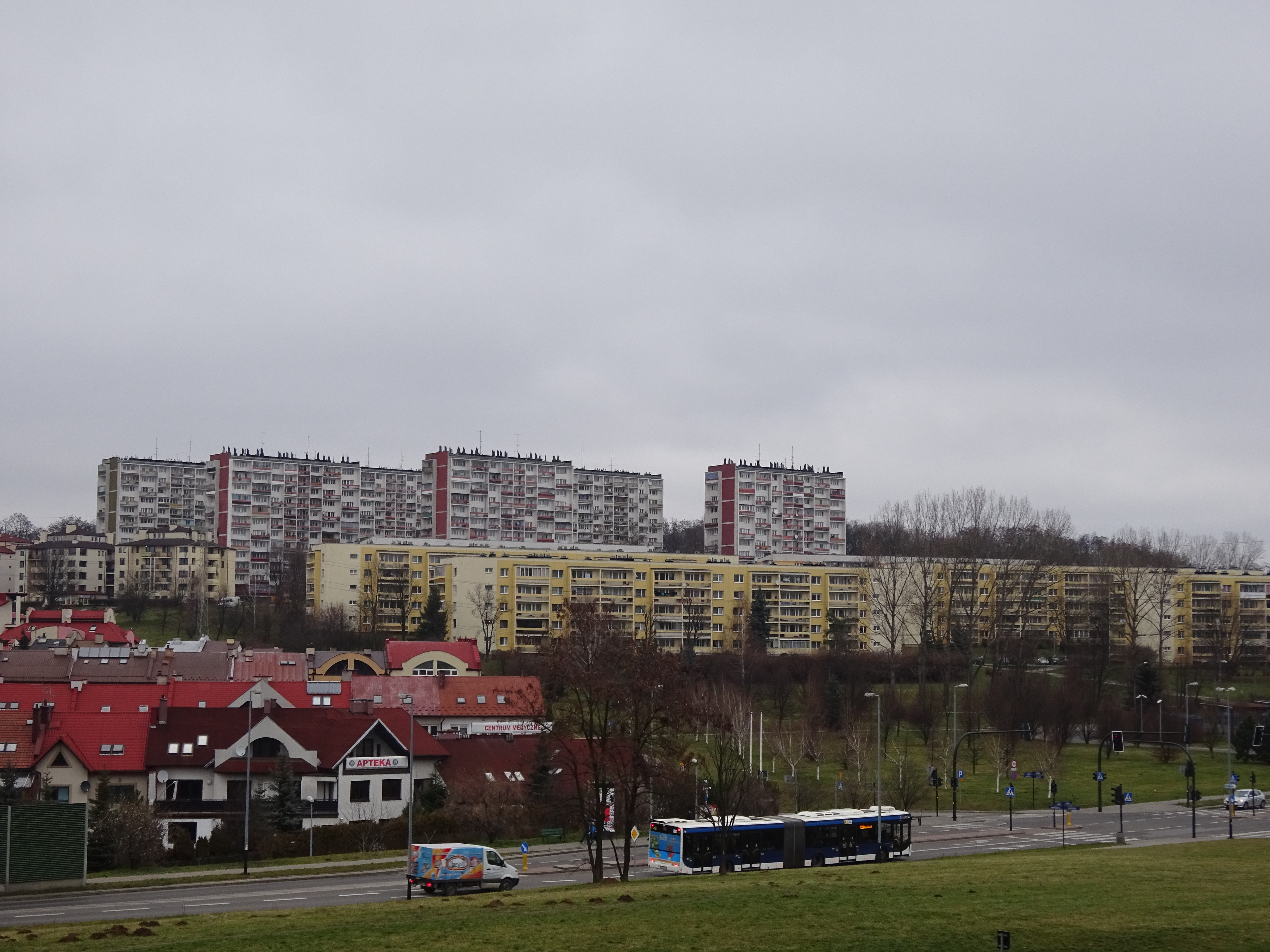 Wieżowce na Os. Złotego Wieku (Kraków) widziane z Osiedla Oświecenia.